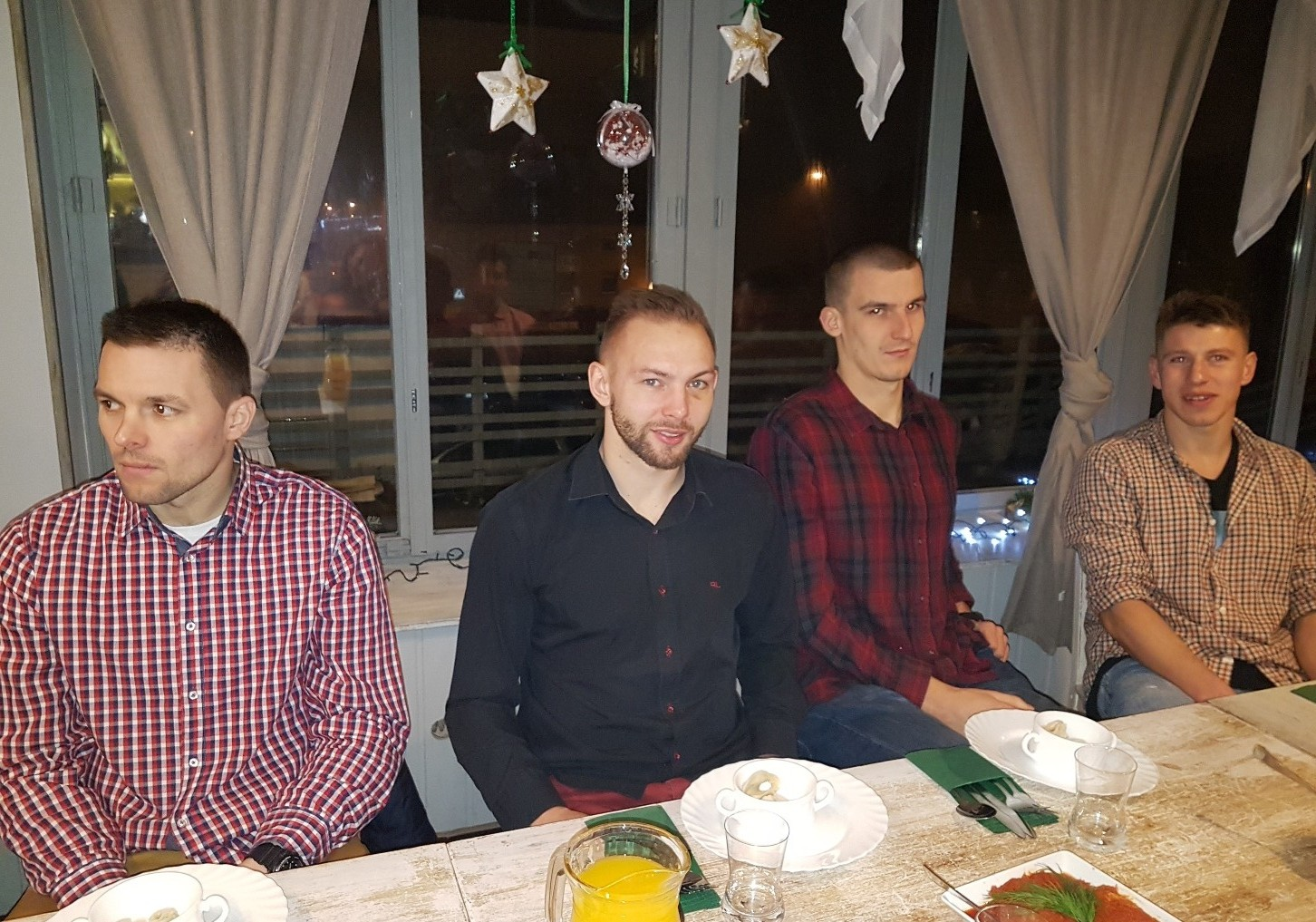 Stargard, 19.12.2017. Koszykarze podczas klubowej wigilii